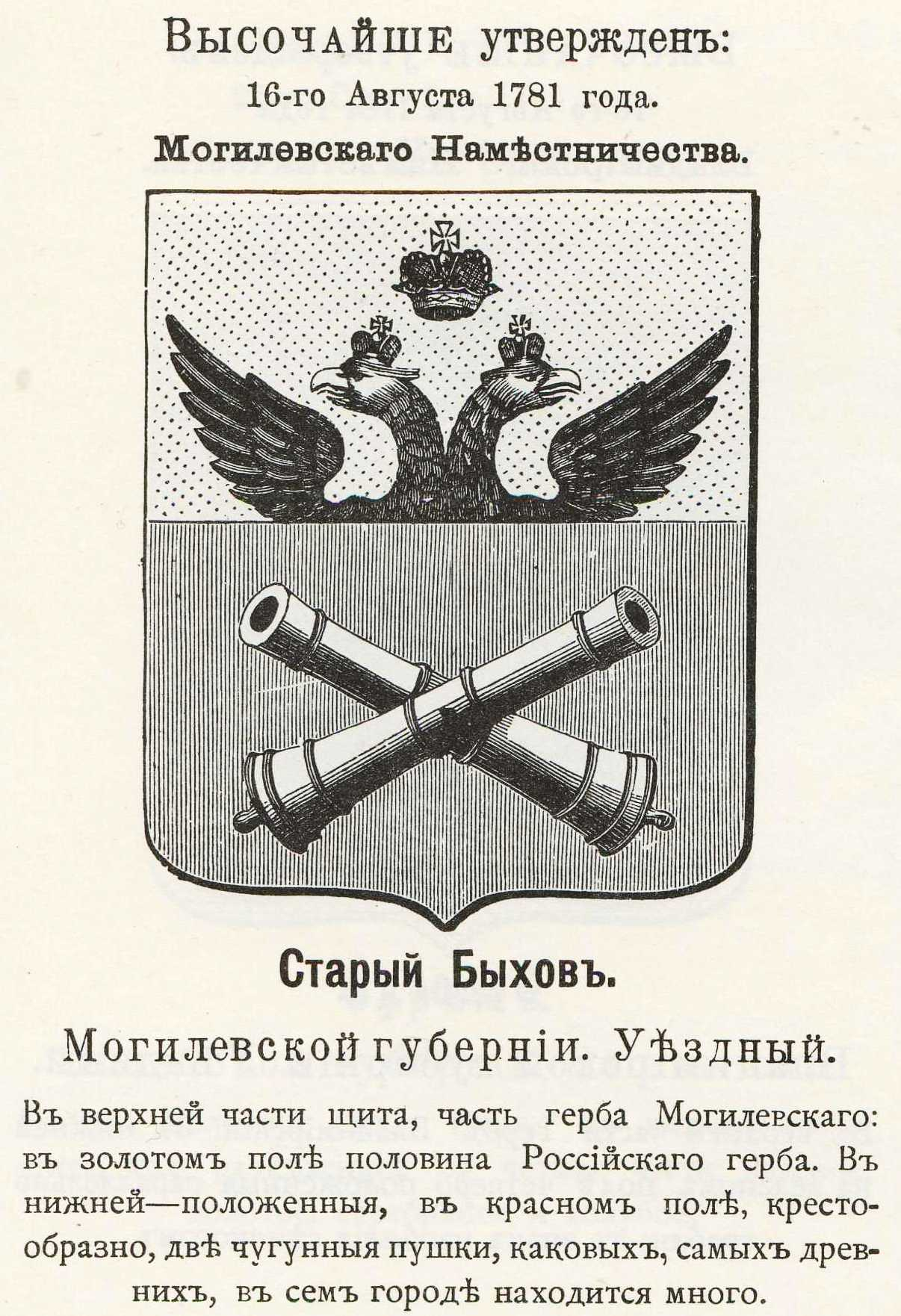 Official Russian Empire coat of arms Old Byhov. Герб Российской Империи уездного города Старый Быхов Могилёвской губернии с официальным описанием в Гербовнике Винклера.